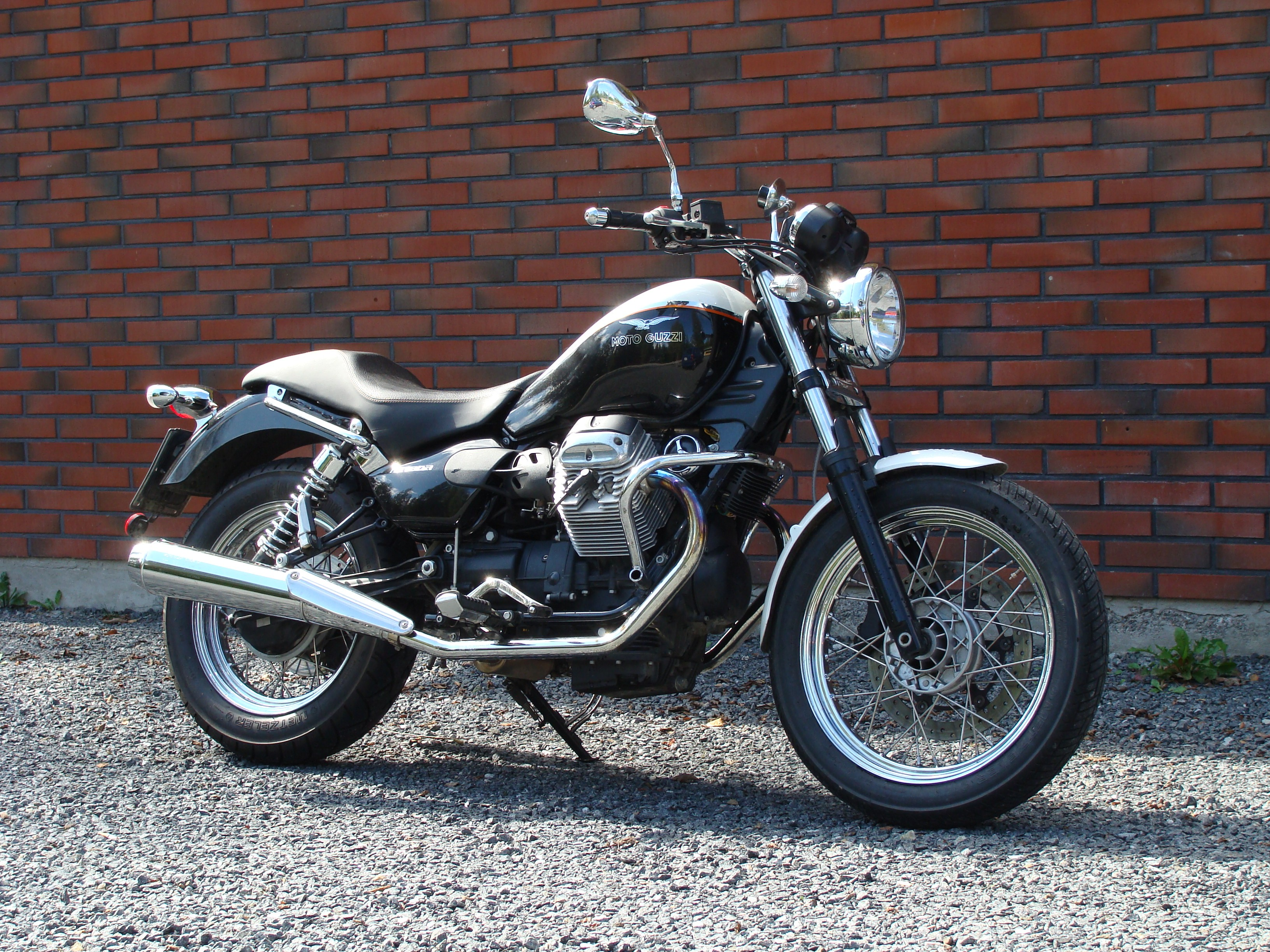 Moto Guzzi Nevada Anniversario customina